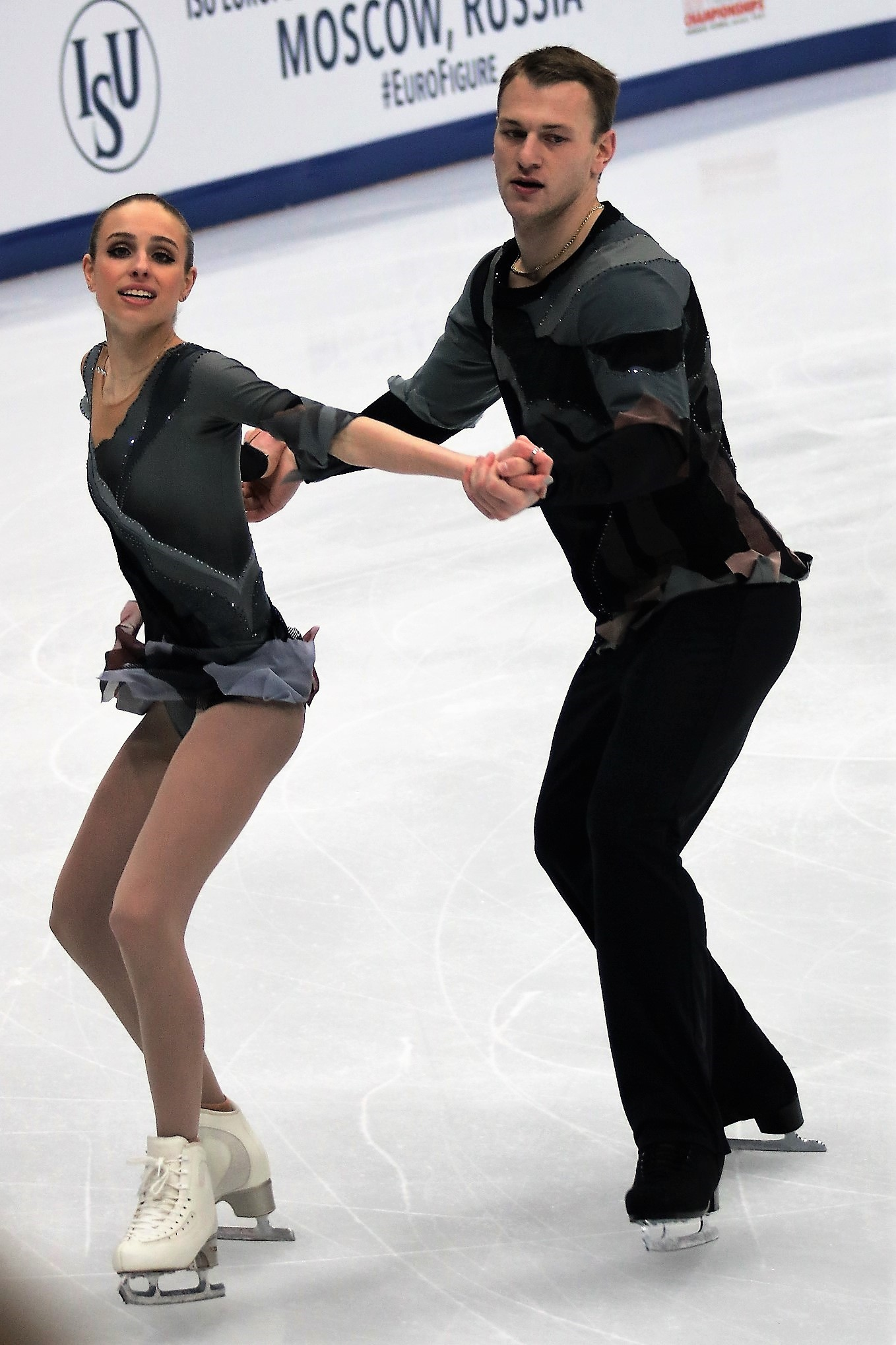 Пэйдж Коннорс / Евгений Краснопольский (Израиль) на Чемпионате Европы по фигурному катанию 2018